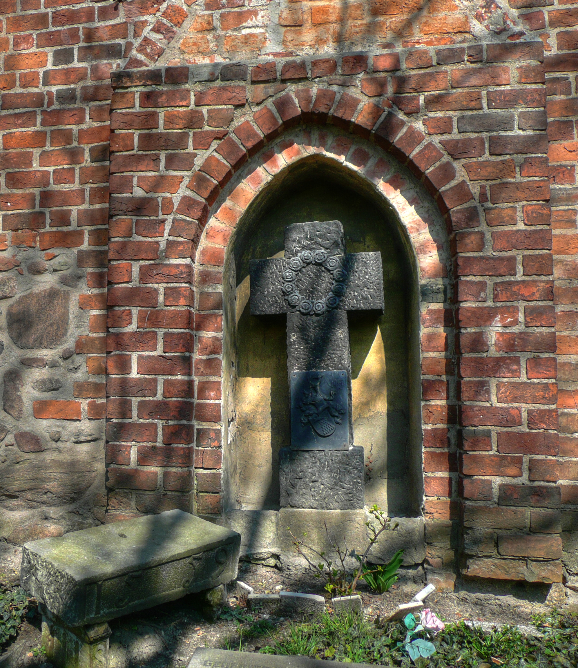 Grabmal in der Außenwand der St.Annen-Kirche, Berlin-Dahlem